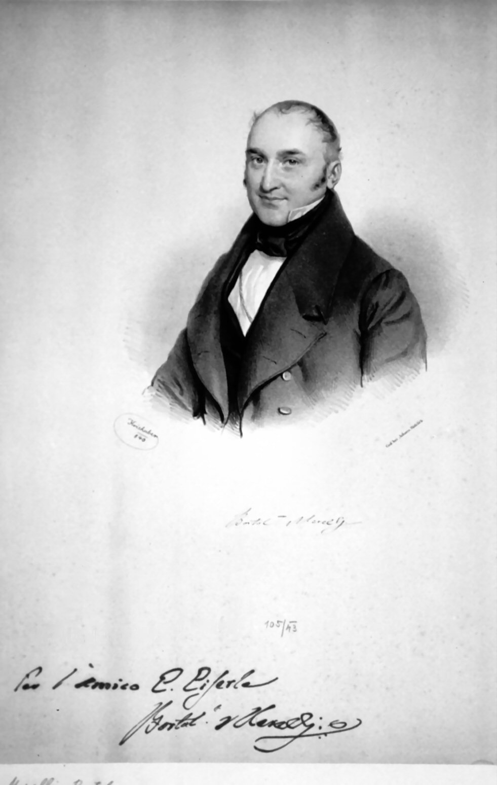 Bartolomeo Merelli (1794-1879), italienischer Impresario, Librettist